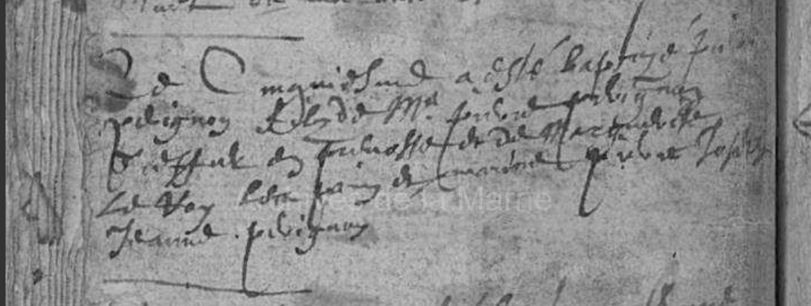 Acte de Baptême de Dom Perignon du 05 Janvier 1639